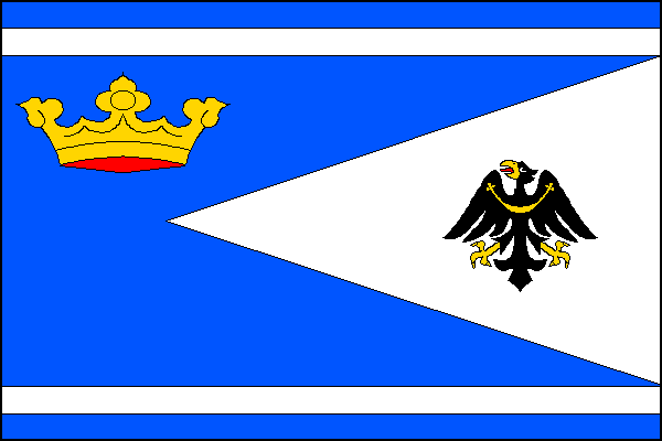 vlajka, Netín, okres Žďár nad Sázavou